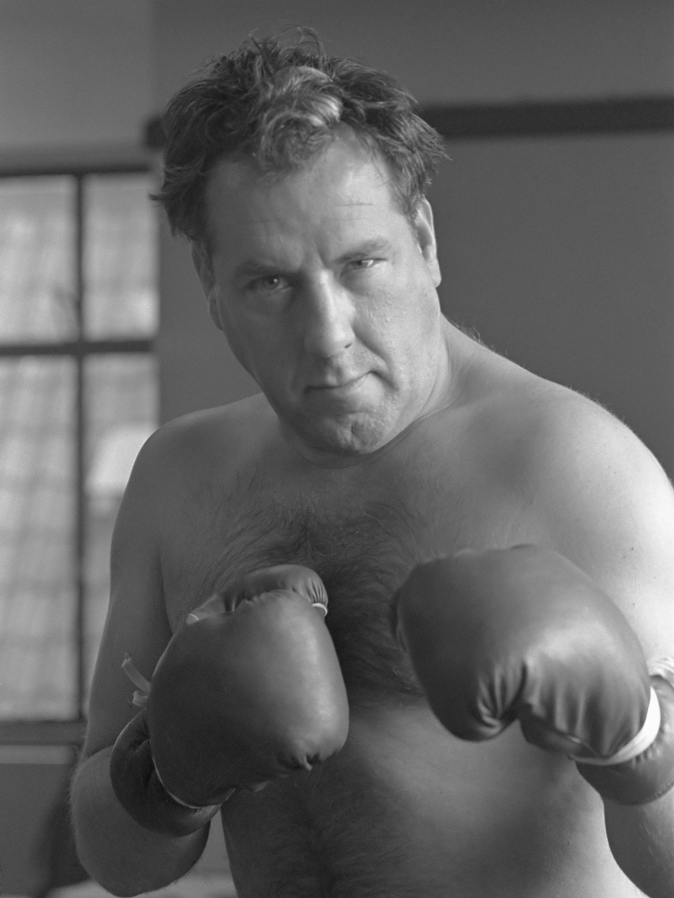 Ko van Dijk traint voor zijn rol in "Requiem van een zwaargewicht" Ko van Dijk 12 november 1959